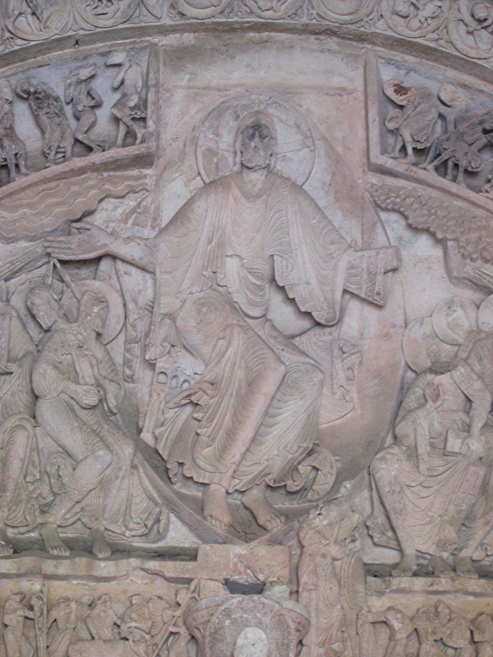 Abbatiale de Vézelay, Bourgogne, France : tympan central du narthex